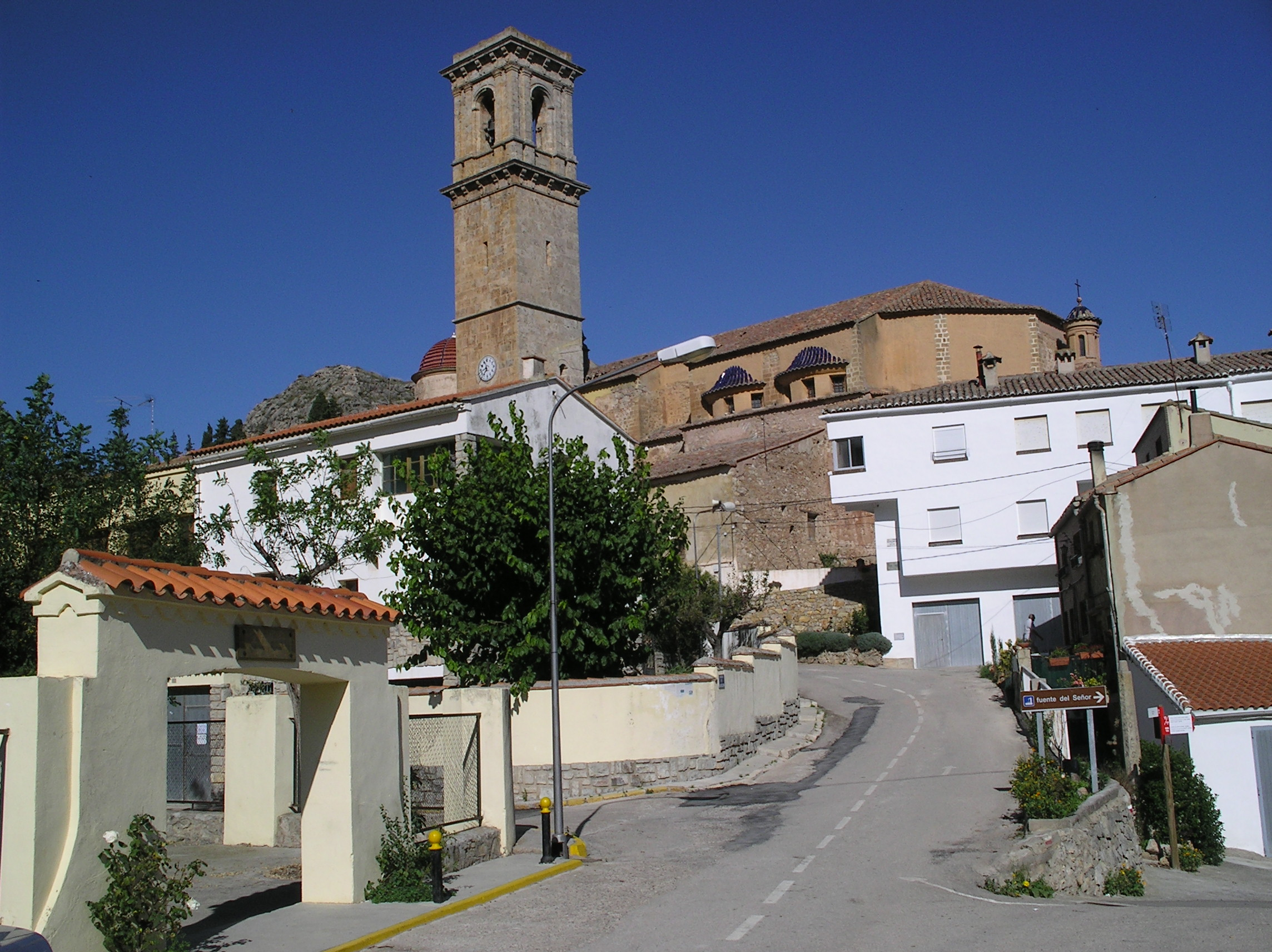 Vista de Andilla desde la entrada, con la Iglesia al fondo